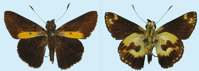 Banta linnei upperside (left), underside (right)